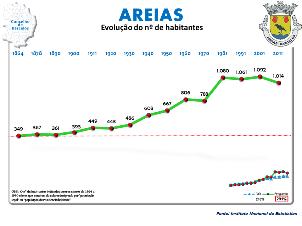 Censos 1864-2011